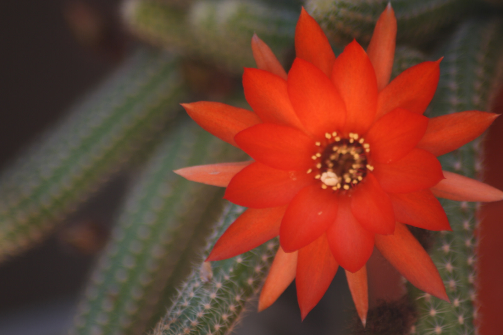 Echinopsis chamaecereus en flor.